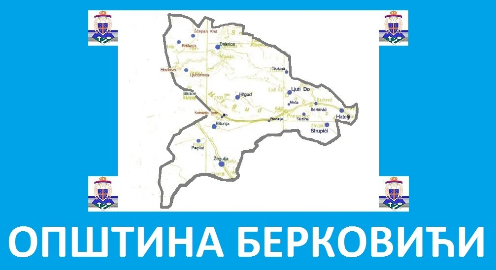 Karta Opstine Berkovici